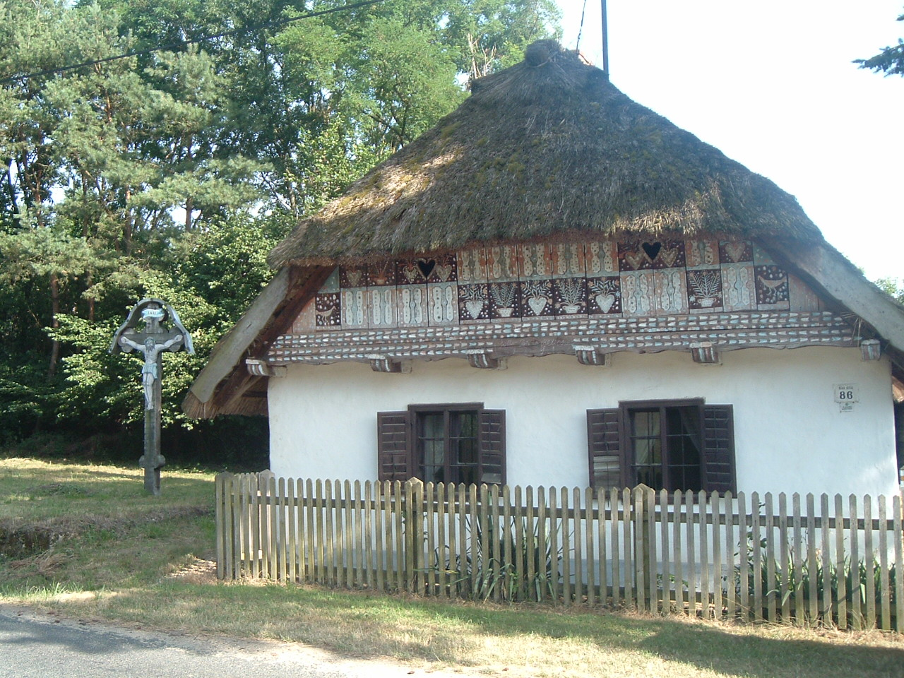 Village museum in Hegyhátszentpéter